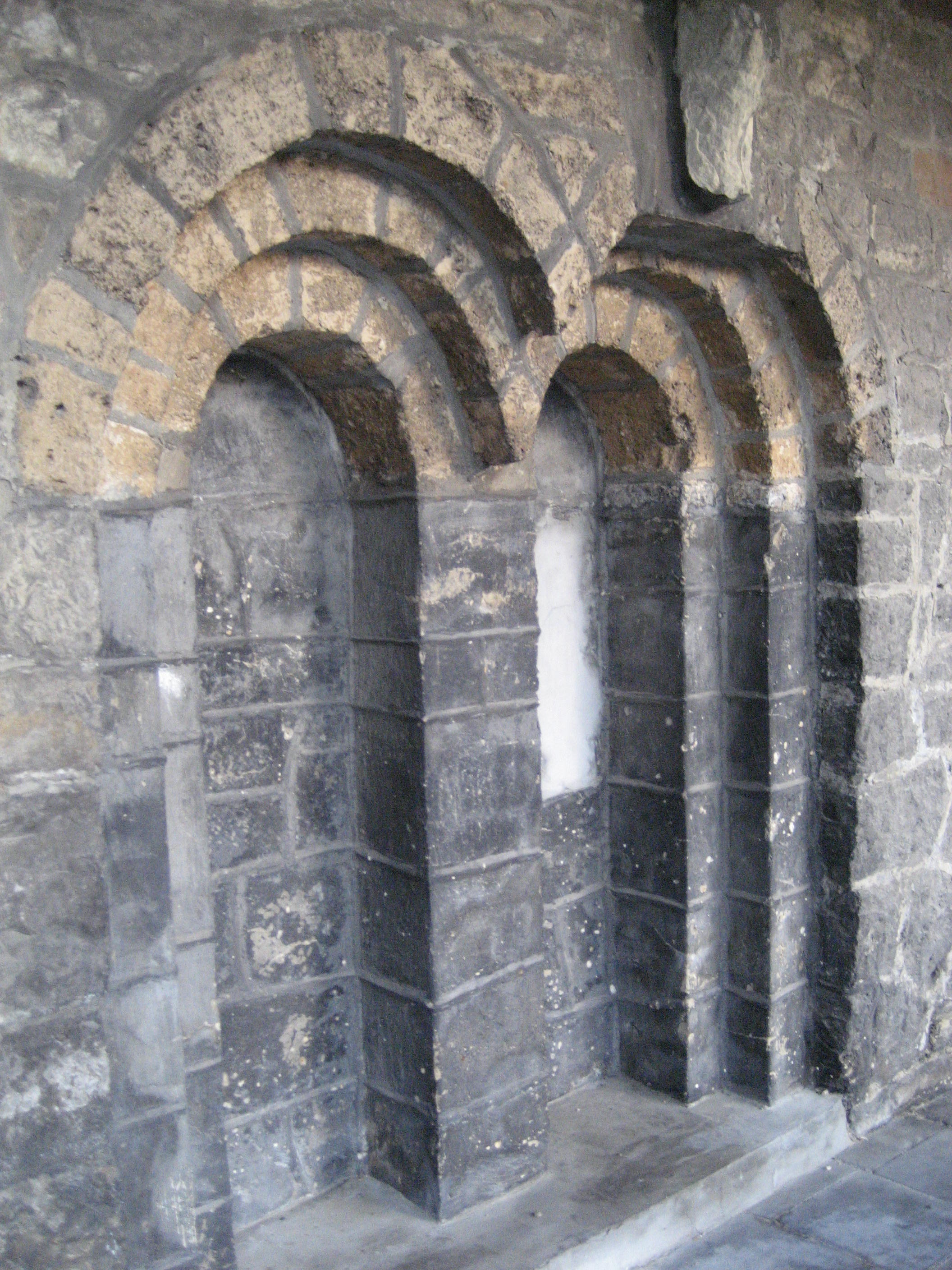 Ancienne abbaye de Neufmoustier : deux ailes de l'ancien cloître, façade remontée; square : crypte et statue de Pierre l'Ermite, avenue Louis Chainaye